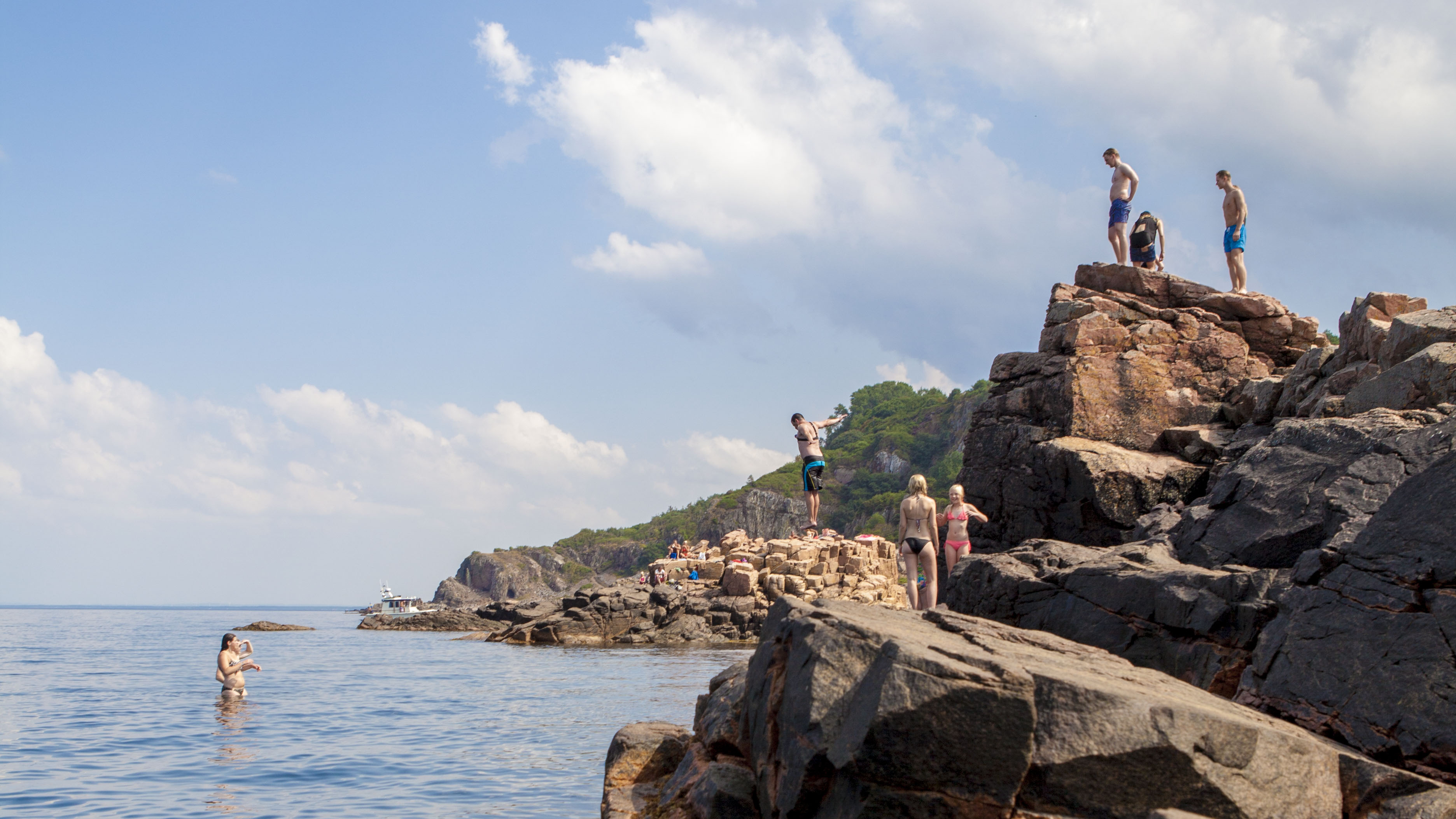 Badklippan vid Hovs hallar.